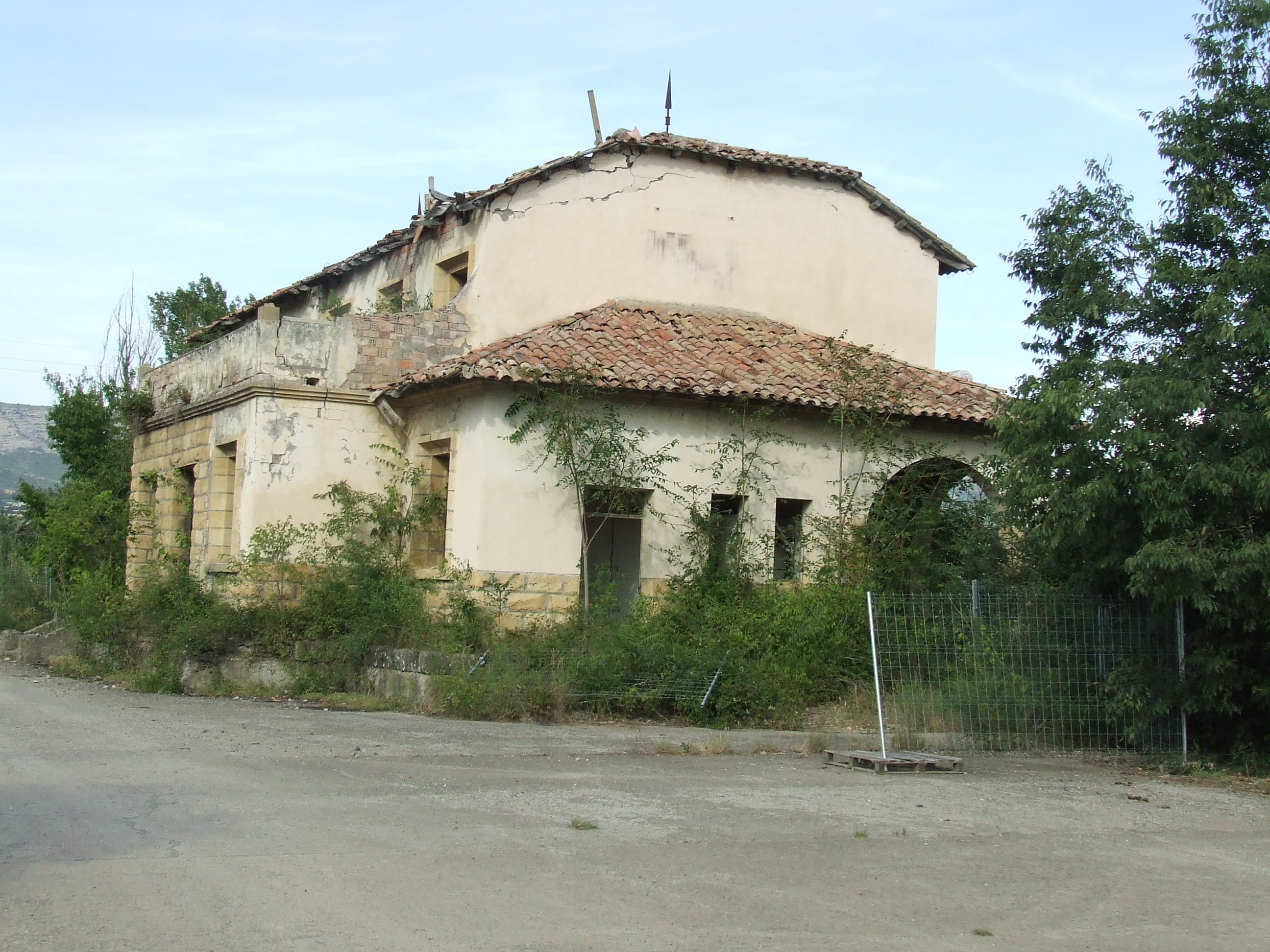 L'Estació vella de Salàs de Pallars (Pallars Jussà)